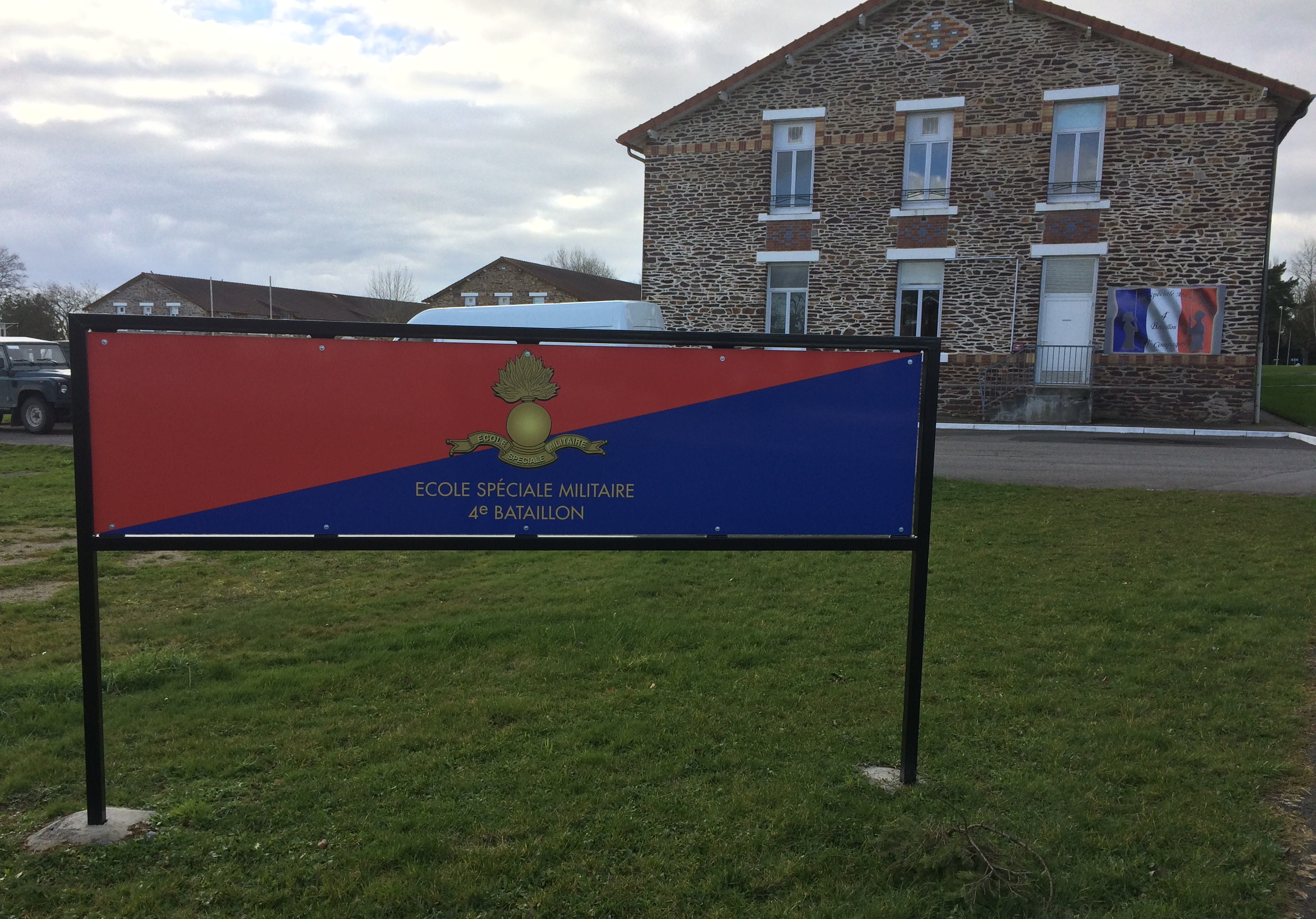 Bâtiments du 4° bataillon de l'école spéciale militaire de Saint-Cyr Coetquidan ; au premier plan, celui de la 13e compagnie en 2018